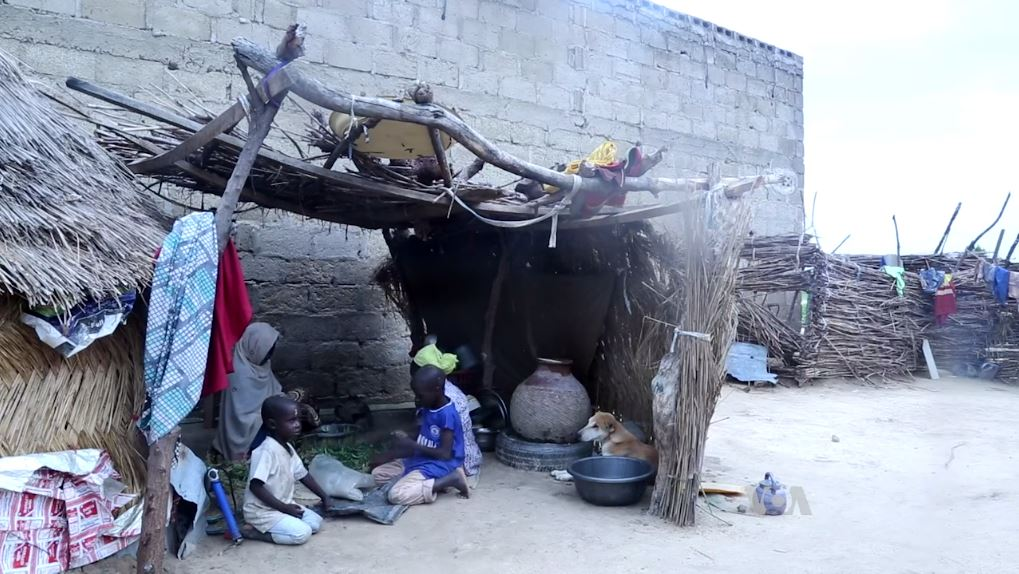 Réfugiés nigérians à Maiduguri en août 2016.